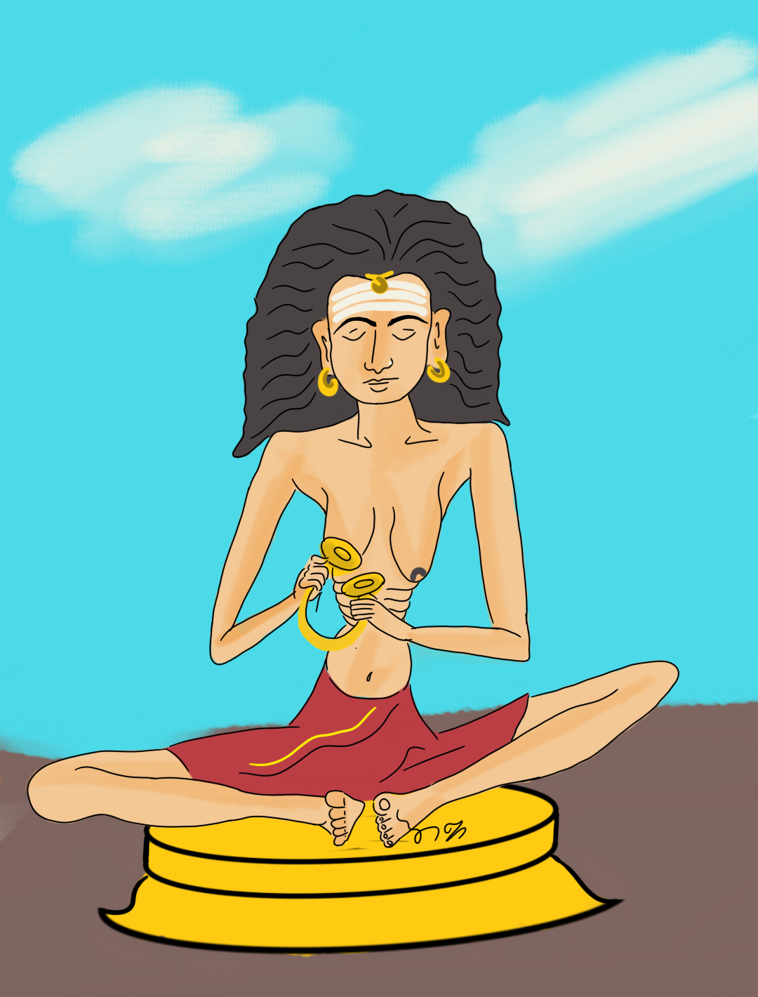 காரைக்கால் அம்மையார் எனும் புனிதவதியின் வரைகலை ஓவியம். அம்மை எப்போதுமே சிவபெருமானை நினைத்து பாடுகிறார்.